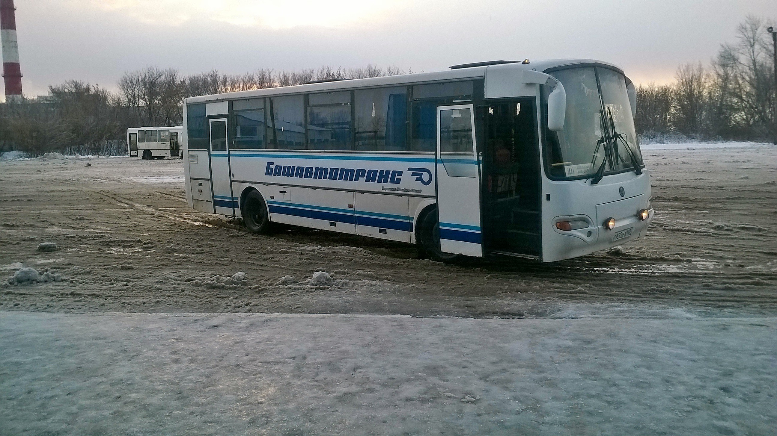 автобус ишимбай салават